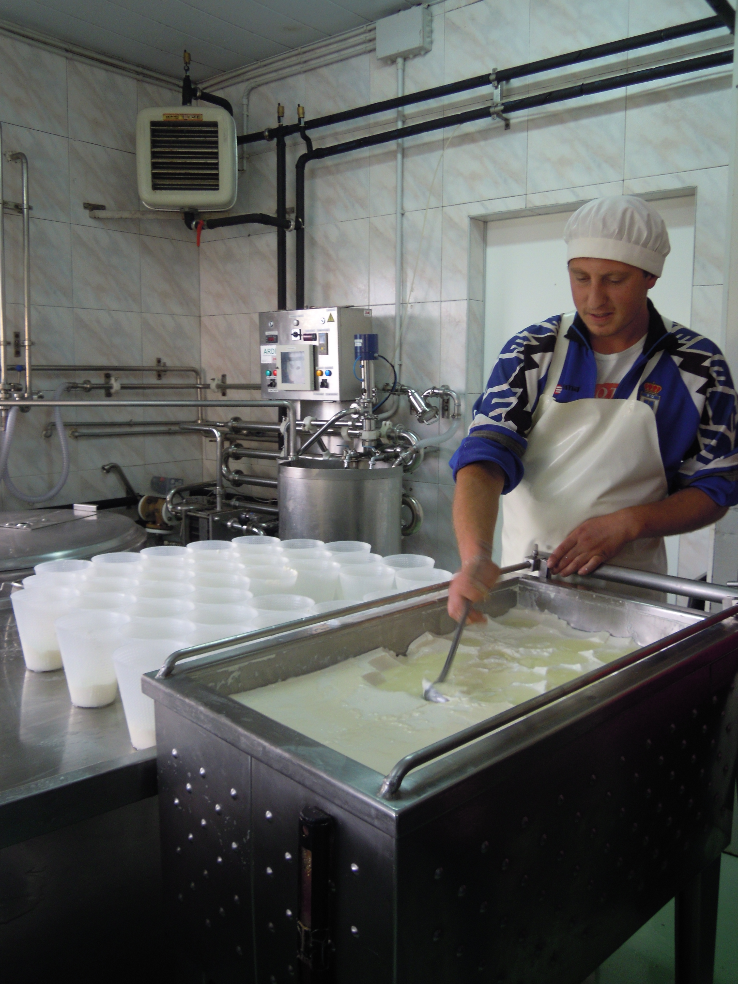 Cola garfiella